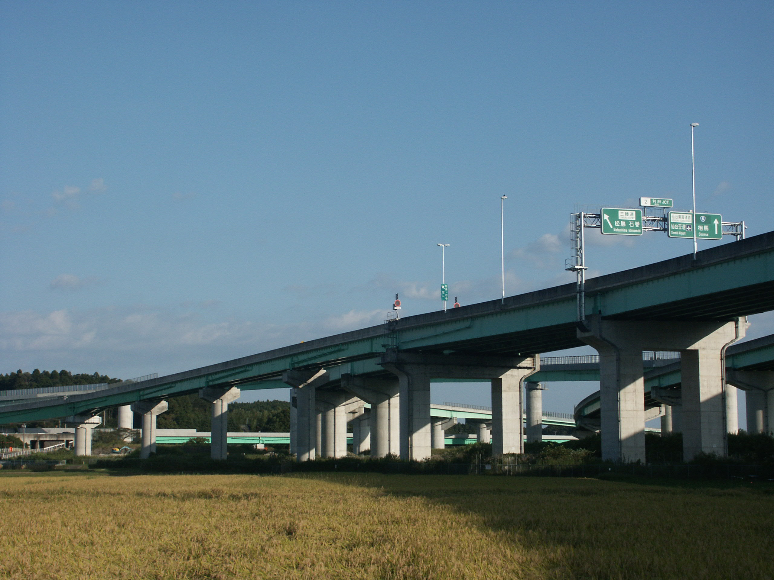 仙台北部道路利府JCT（富谷JCT方面側から撮影）